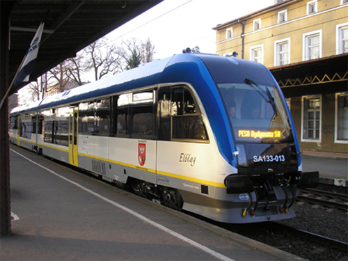 Szynobus ELBLĄG stoi na stacji w Elblągu